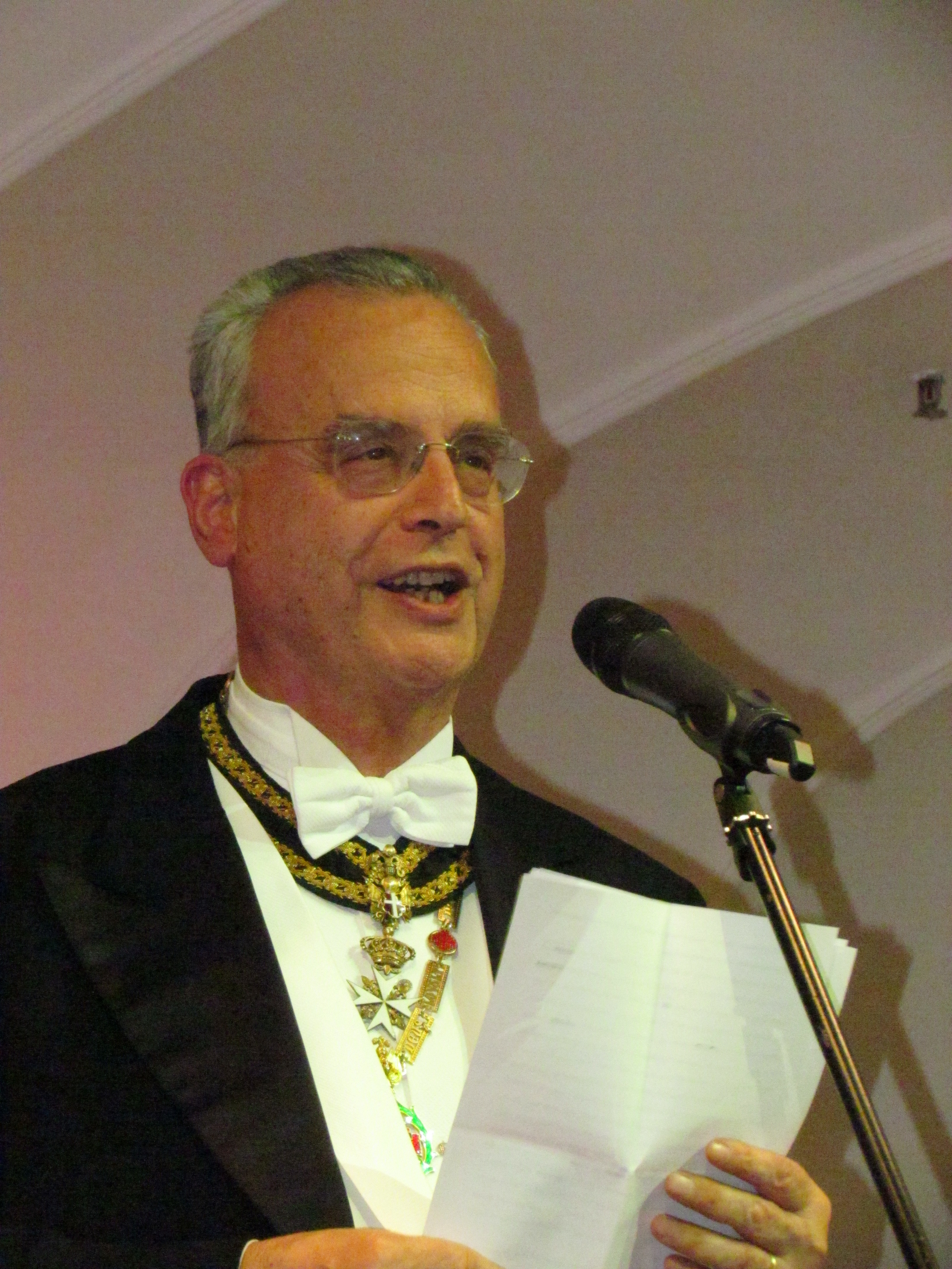 Conte Agostino Giorgio Borromeo, storico italiano. Dal 2009 è Governatore Generale dell'Ordine Equestre del Santo Sepolcro di Gerusalemme.